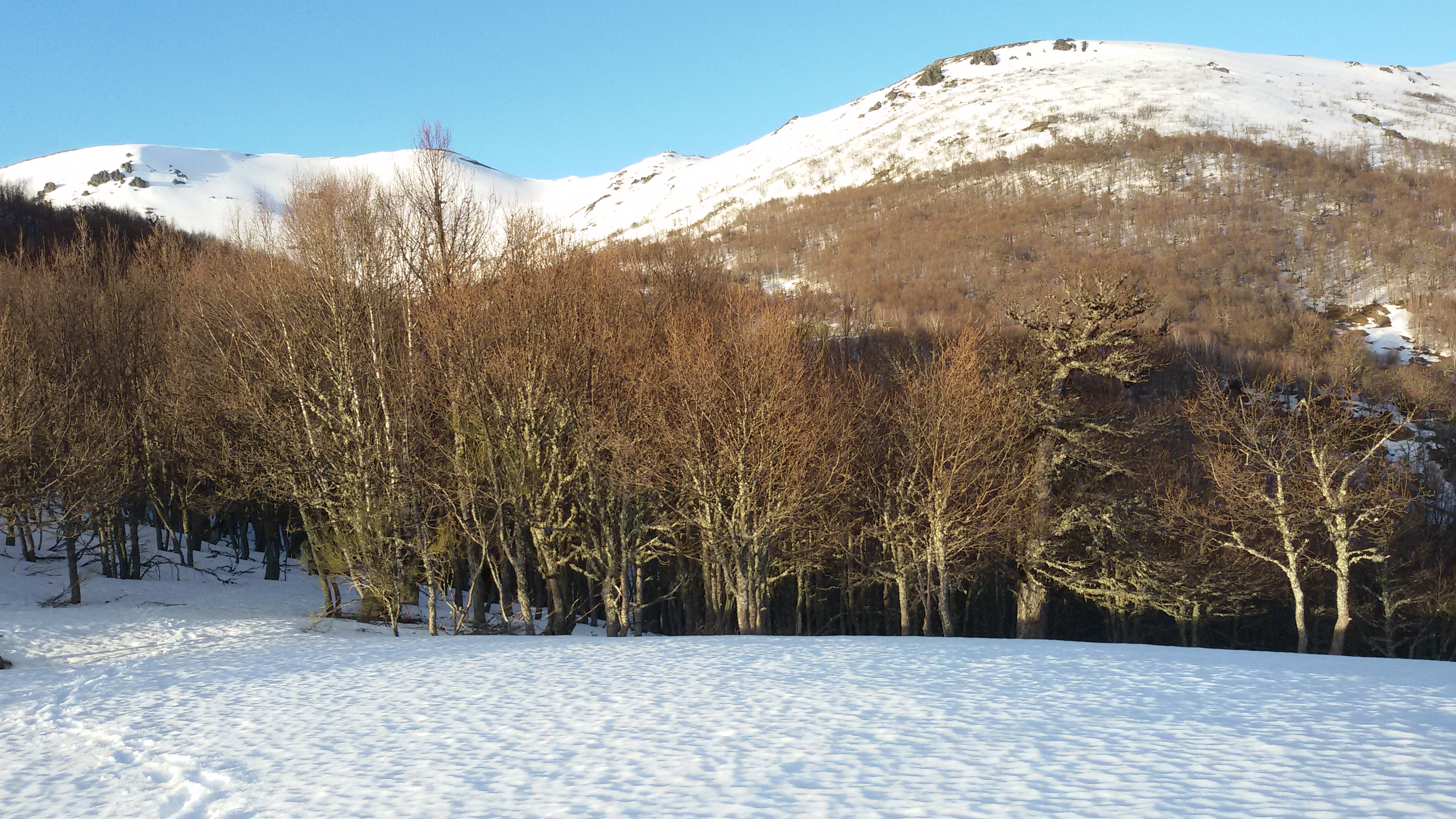 Bosque de Hormas nevado visto desde el Pico de Éscaro